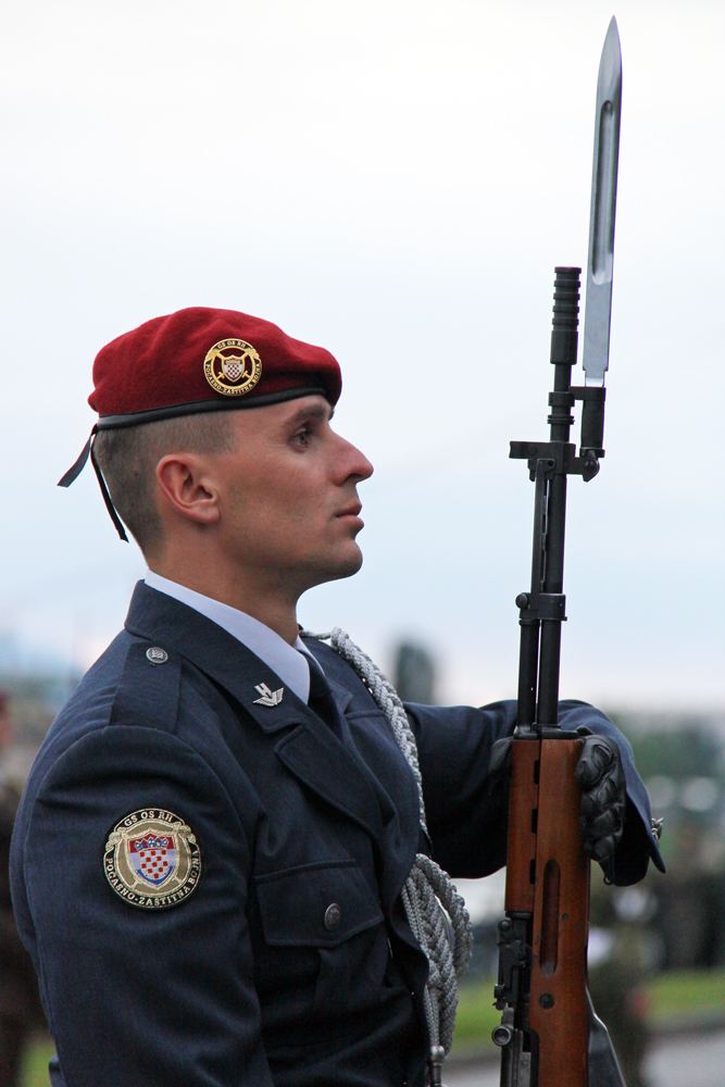 Dan OSRH